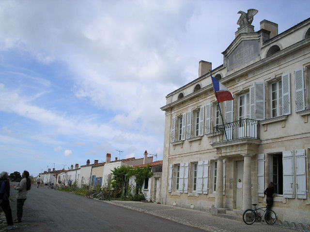 Ile d'Aix, Franciaország